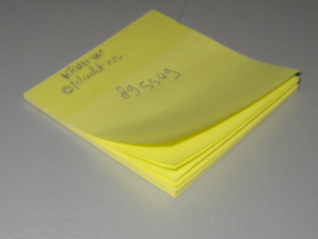 Gele post-it, november 2004